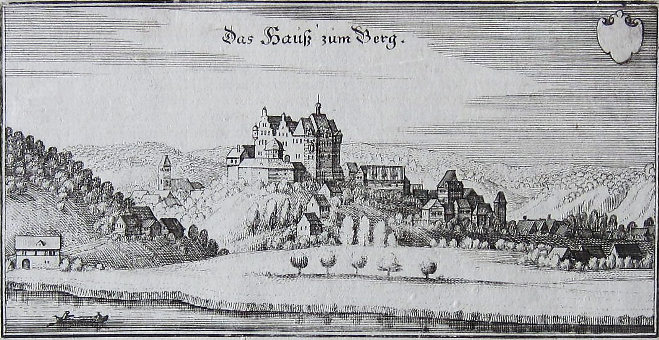 Ansicht der Schalksburg (Das Haus zum Berg) in Hausberge, Porta Westfalica. Kupferstich von Matthäus Merian um 1640.